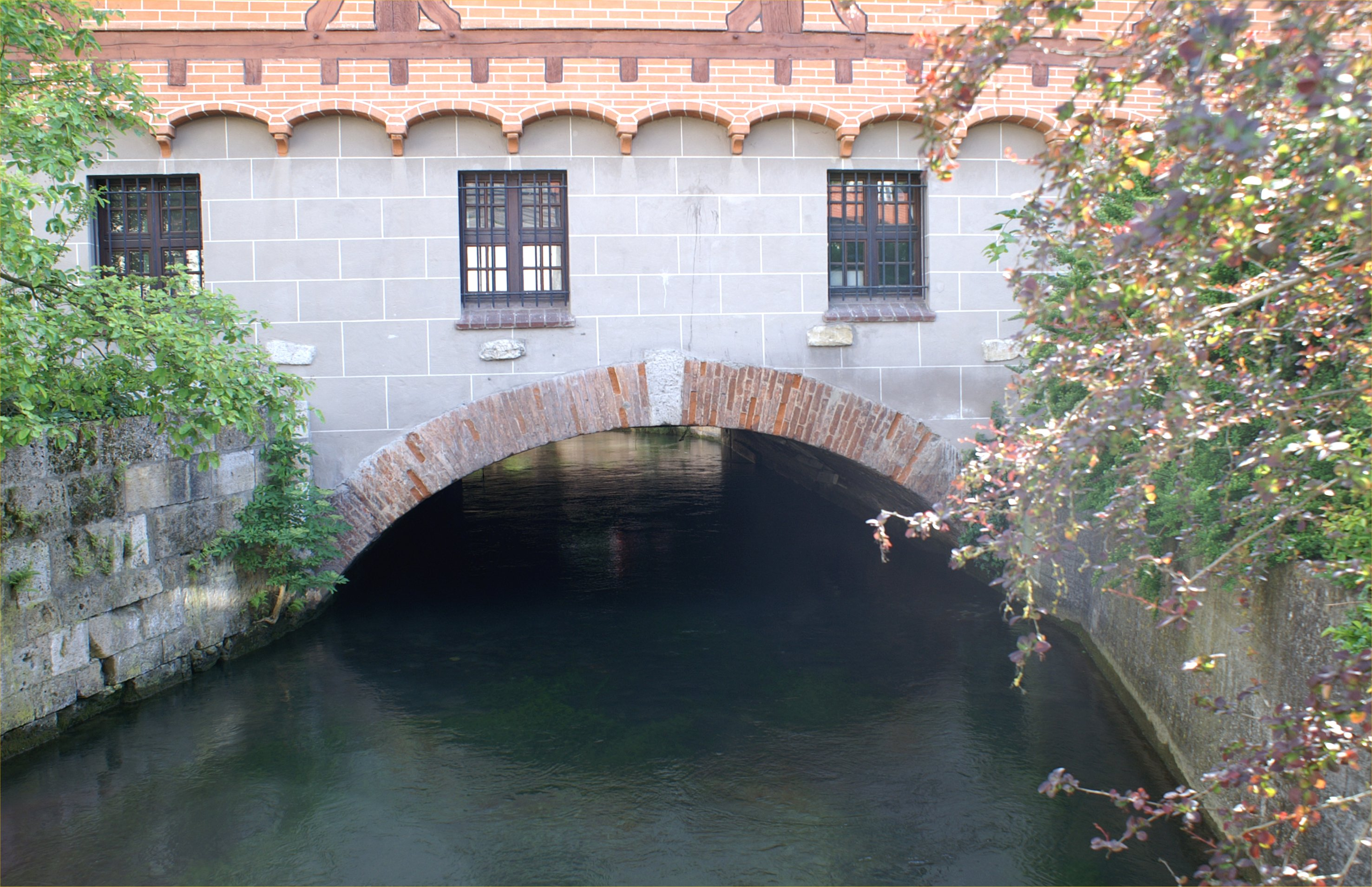 Wasserunterführung beim Heilig-Geist-Spital (städtisches Museum) in Ehingen (Donau)